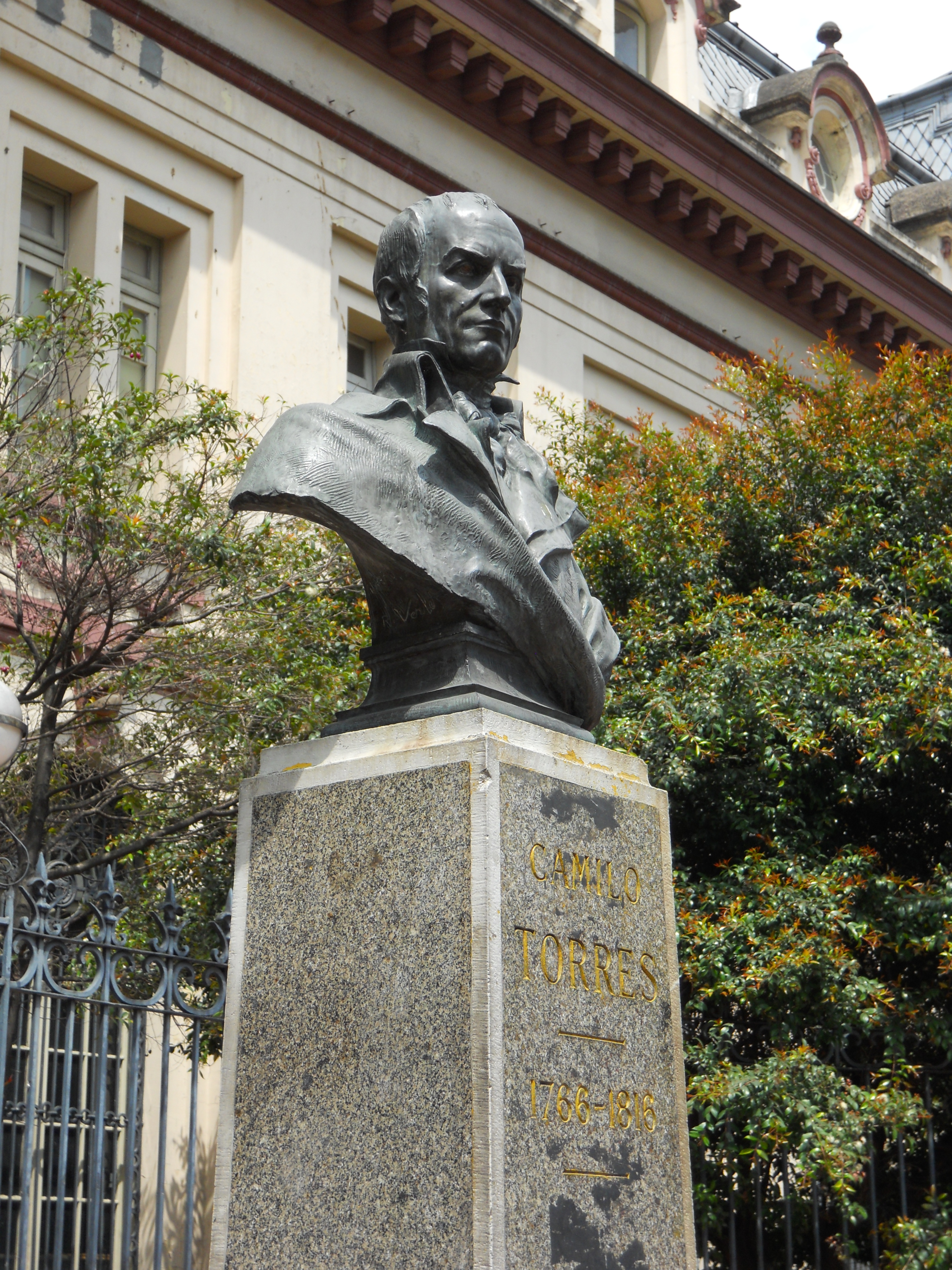 Busto de Camillo Torres en la ASAB Academia Superior de Artes de Bogotá